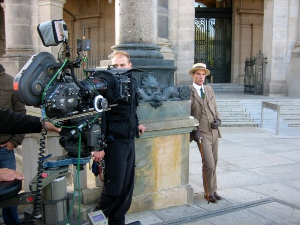 Wil Röttgen bei den Dreharbeiten zum Porsche-Werbefilm SPEEDMASTER in 2012.